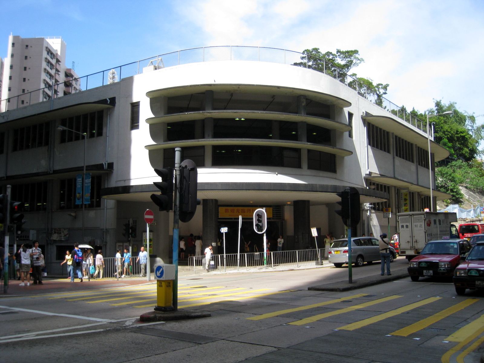 Wan Chai Market 灣仔街市